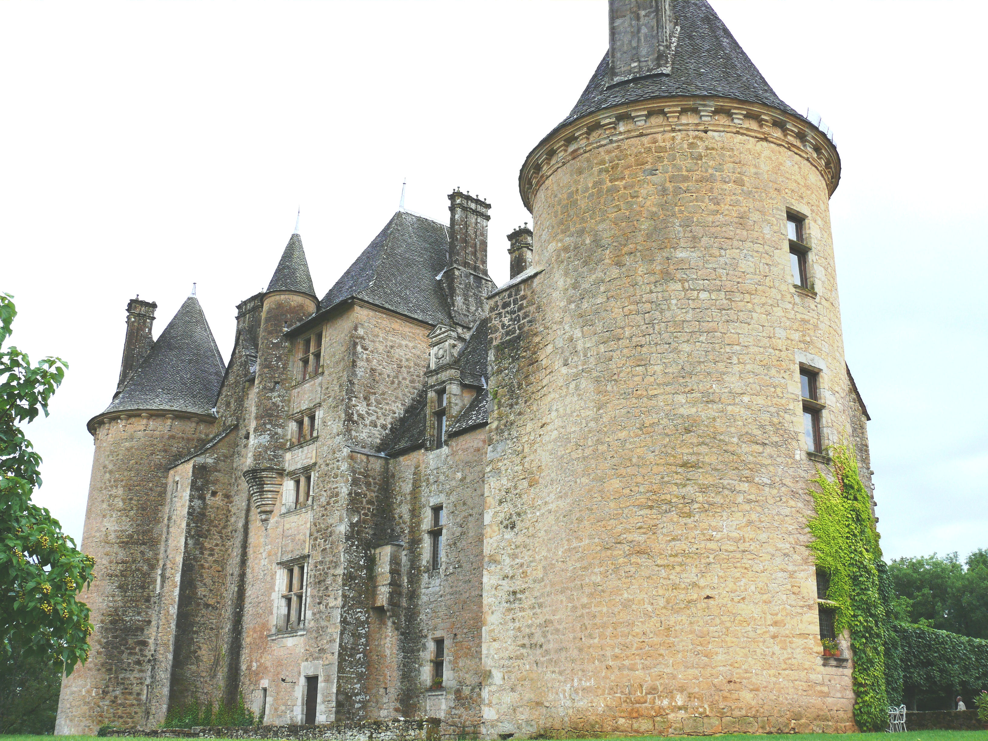 Château de Montal - Le château du XVème siècle